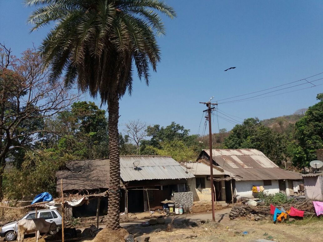 खारावडे गाव